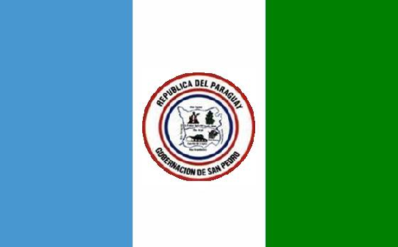 Bandera del Departamento de San Pedro de Paraguay